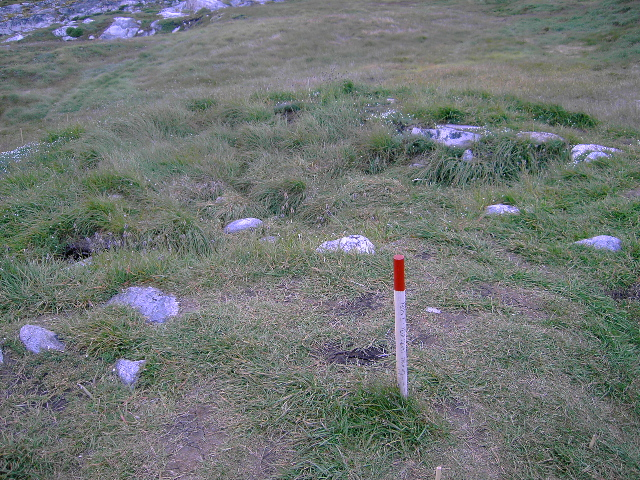 Archäologische Fundstätte eines Jagdplatzes der Saqqaq-Kultur bei Sermermiut an der Diskobucht, Grönland